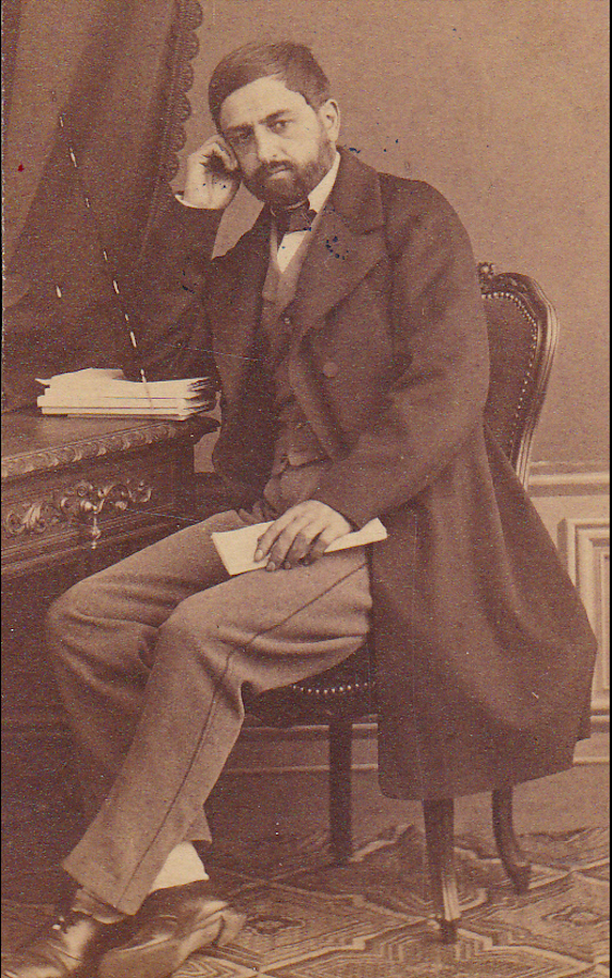 Léon Olphe-Galliard, ornithologue